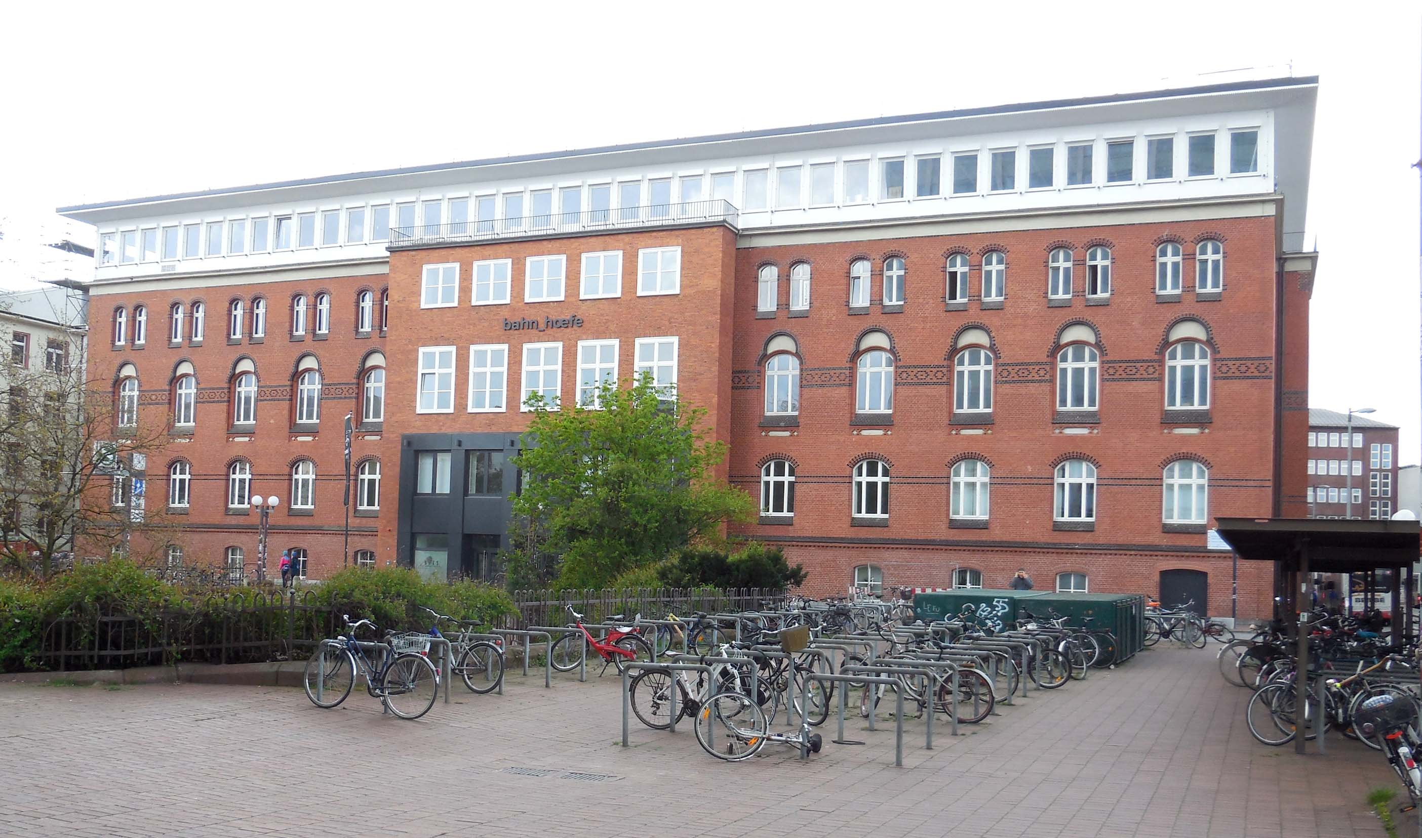 Dienstgebäude Eisenbahndirektion Altona, Front Museumstraße